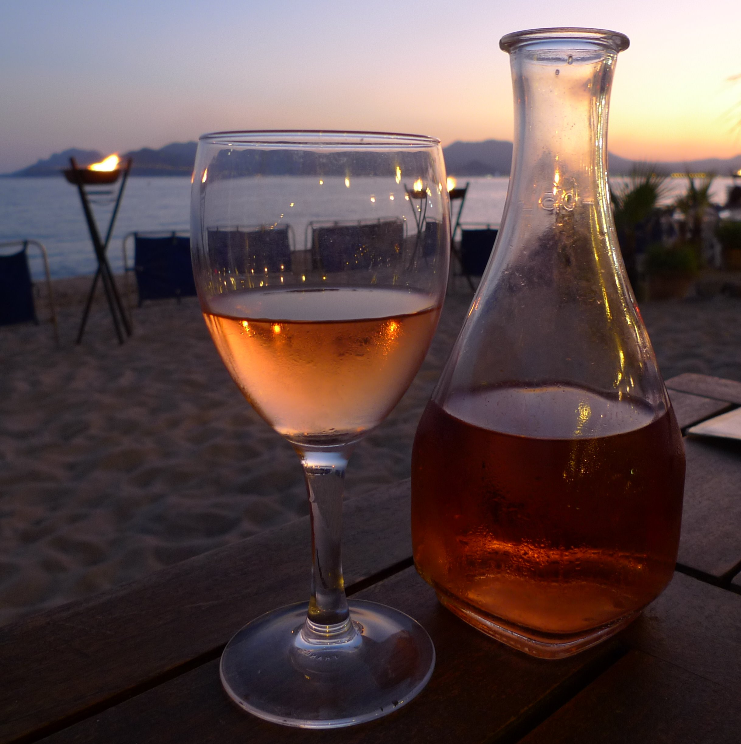 Carafe et verre de rosé de l'IGP Mont-Caume